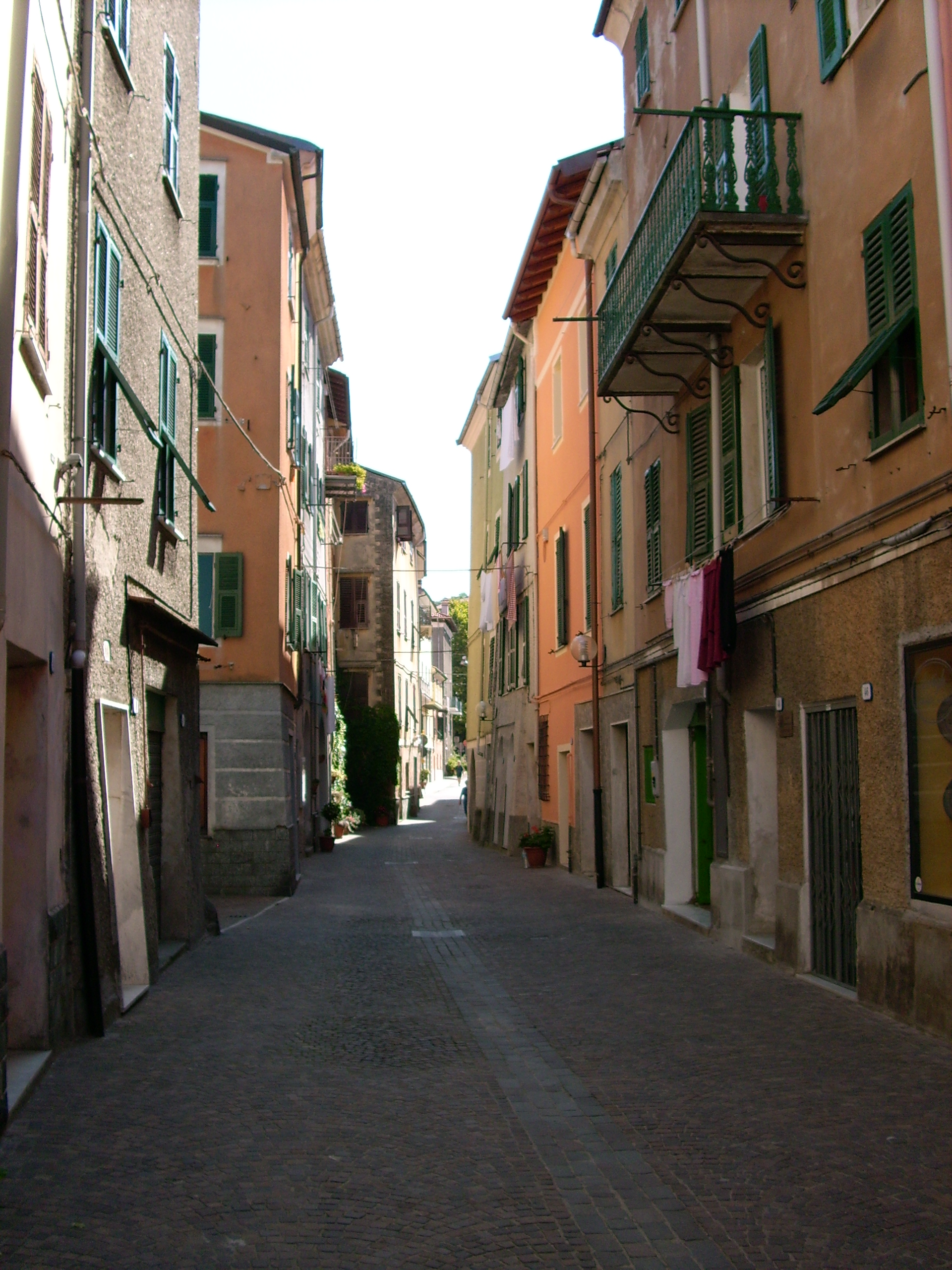 Altare, Liguria, Italia